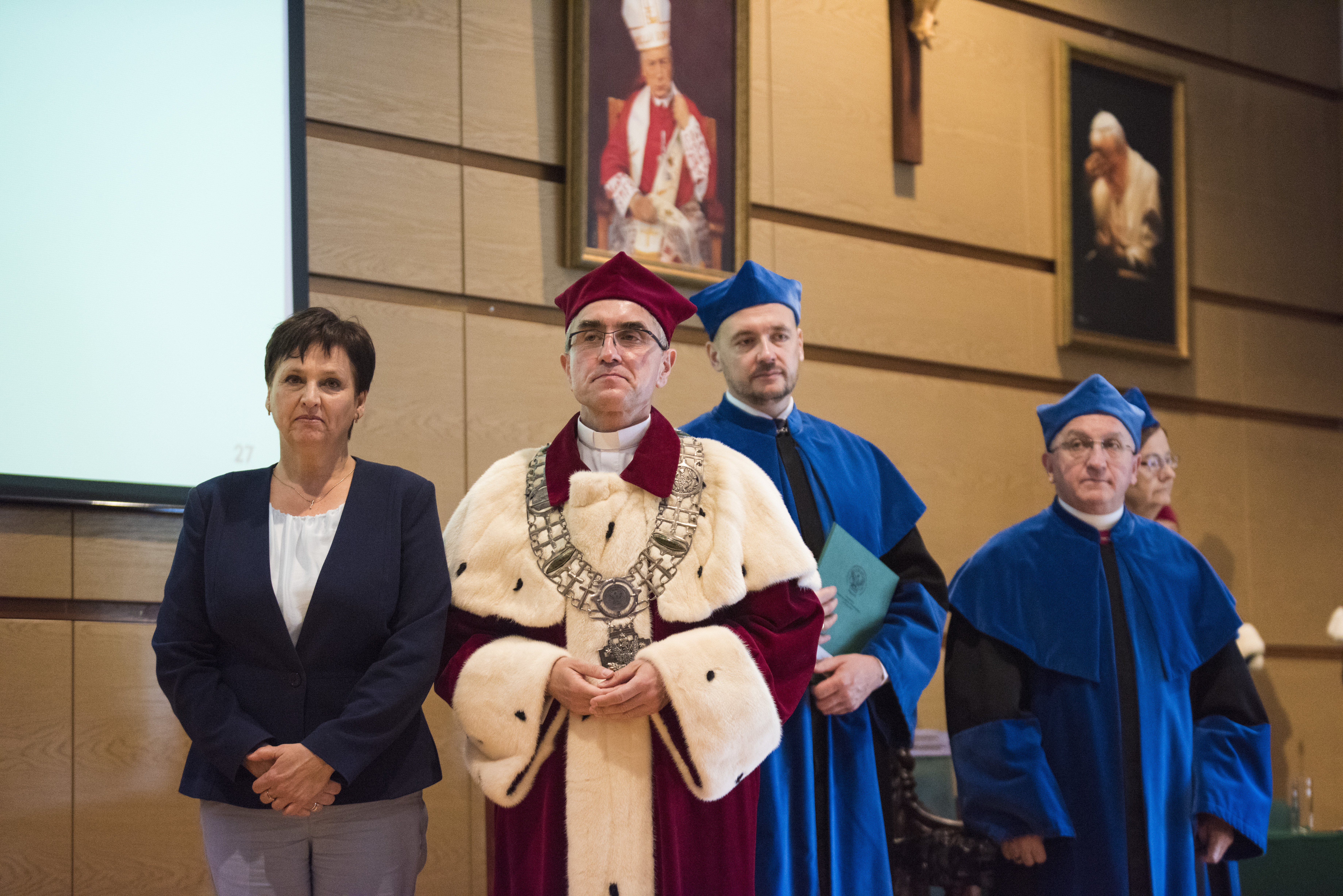 Obchody święta UKSW w Warszawie, od lewej Halina Szymańska i rektor Stanisław Dziekoński.